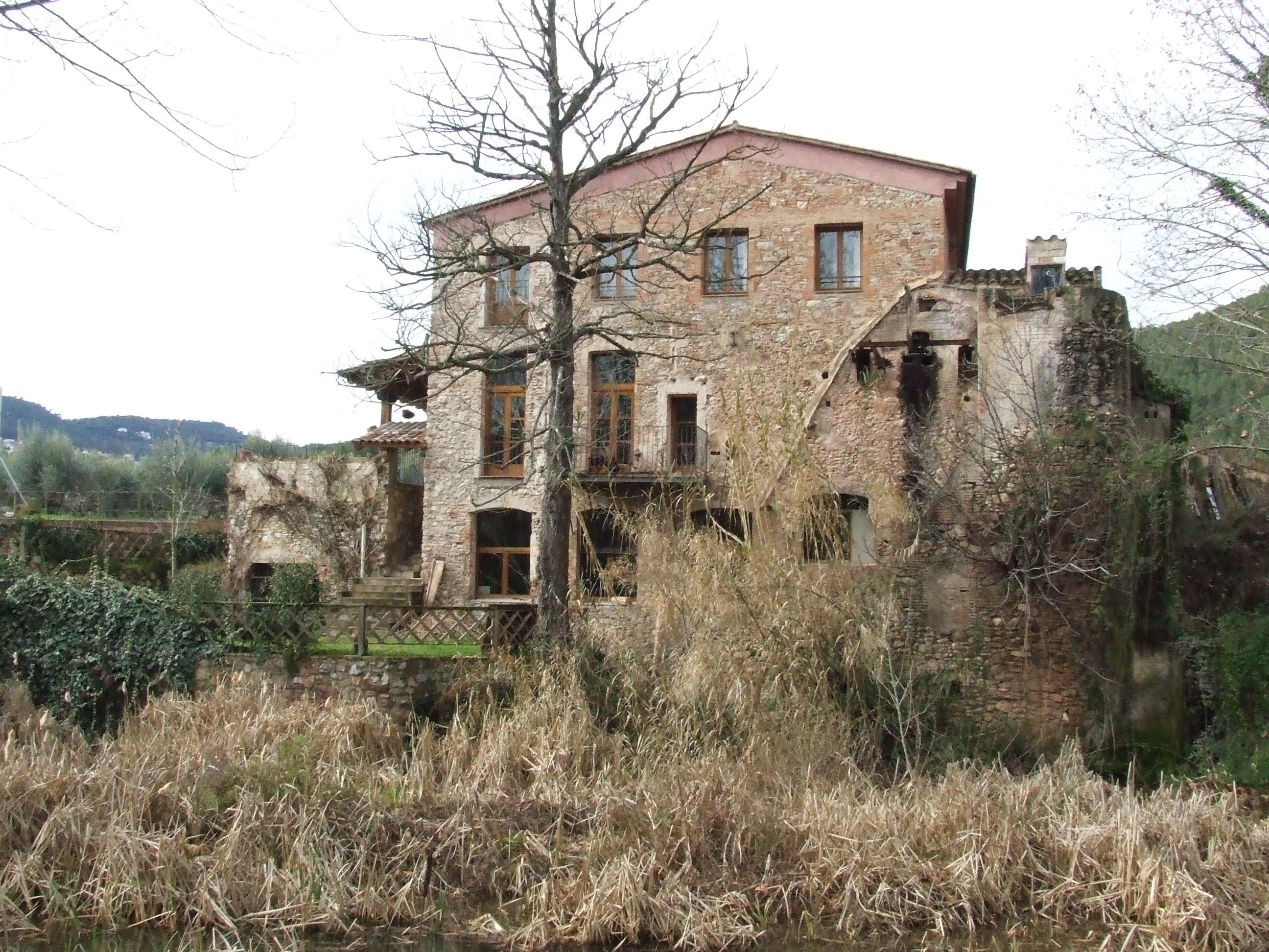 El Molí de la Torre (Bigues, Bigues i Riells, Vallès Oriental)